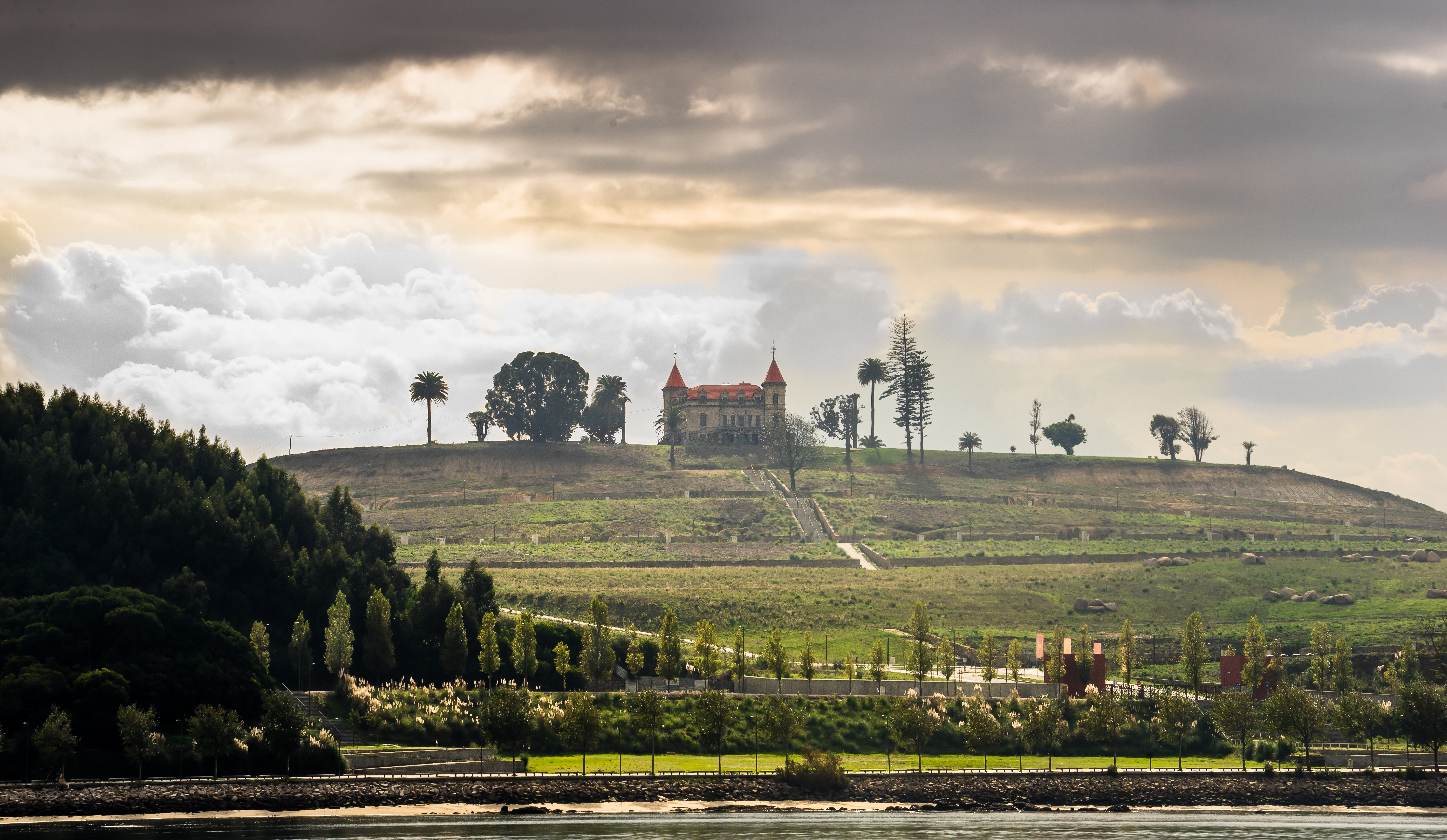 Vila Nova de Gaia, (Porto) Lent Sony G